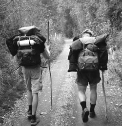 Wandervögel auf Alaska-Fahrt 2004 (Original text: Wandervögel auf Alaska Fahrt) Fotograf: Kaspek, Datum der Aufnahme: 2004